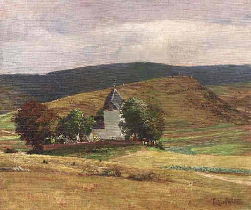 Kirche Alendorf (Ortsteil von Blankenheim) in der Eifel, mit Kreuzweg. Öl auf Leinwand auf Holz, 52 x 62 cm